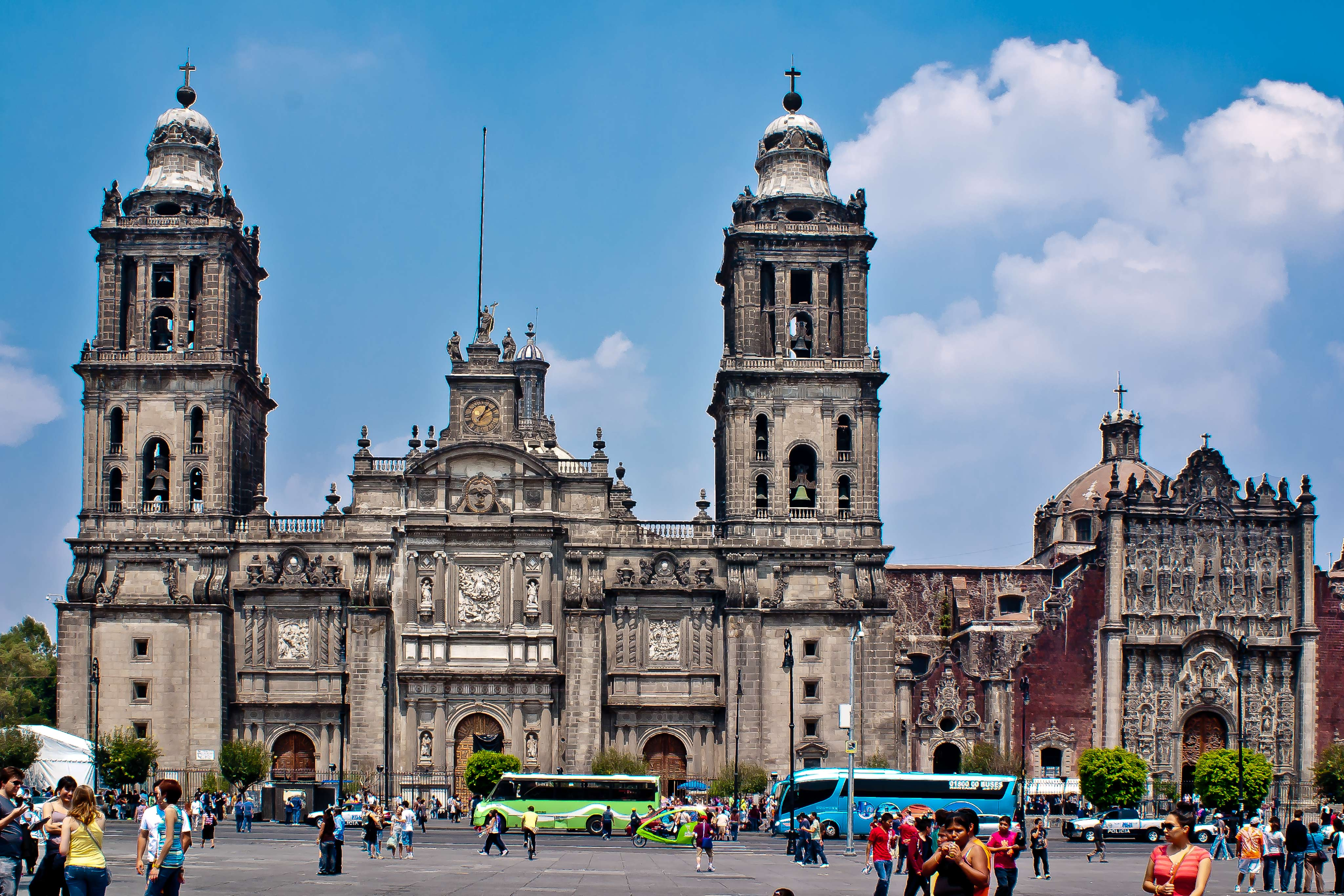 Catedral Metropolitana de la Ciudad de México.